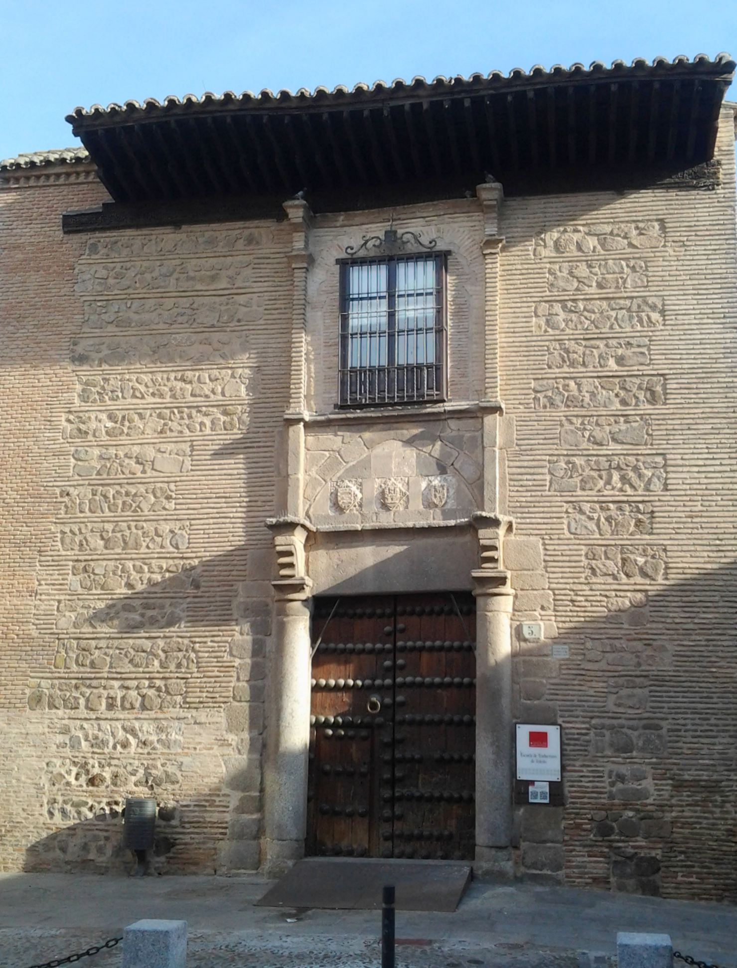 مدرسة طليطلة للمترجمين من الجانب.